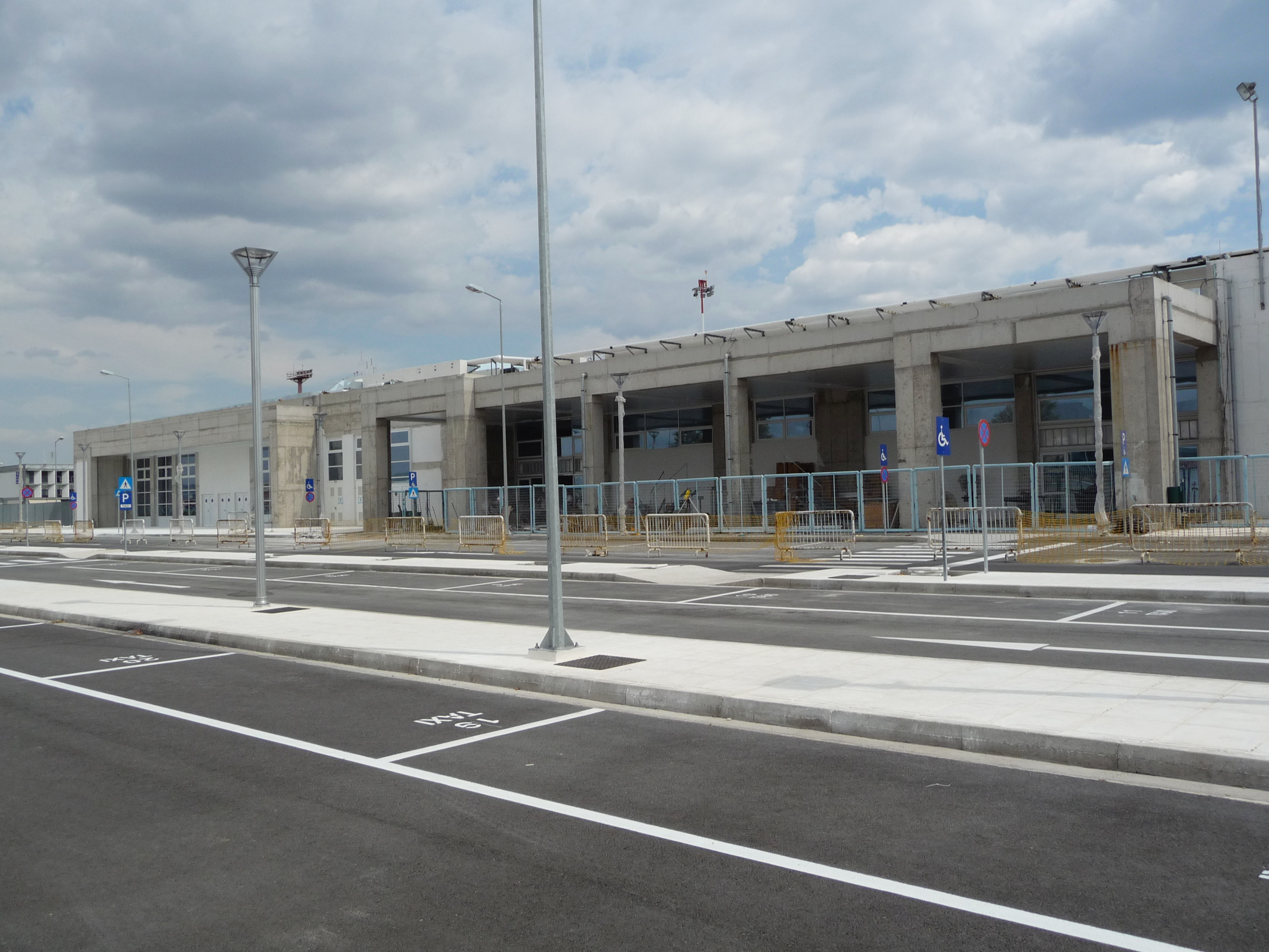 Flughafen Demokritos von Alexandroupolis